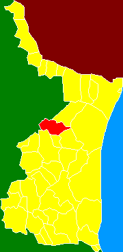 Localización Municipio de Burgos, Tamaulipas